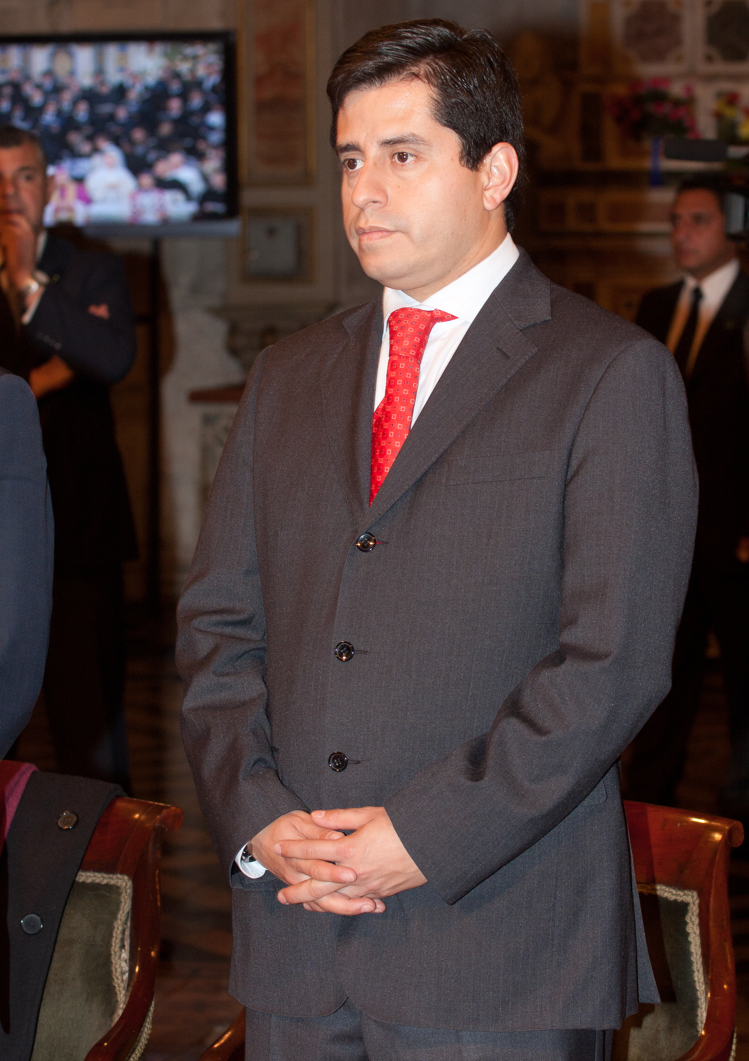 Una promesa solemne de los parlamentarios para poner todo el empeño “en hacer de Chile una Patria de hermanos, donde cada uno tenga pan, respeto y alegría, donde reine la paz, la justicia, la solidaridad, y para que Chile sea una nación bendecida por Dios, tierra de encuentro y esperanza” fue uno de los momentos culminantes del Te Deum Ecuménico, el segundo de los eventos de conmemoración del Bicentenario del Congreso Nacional, realizada este domingo 3 de julio del 2011.